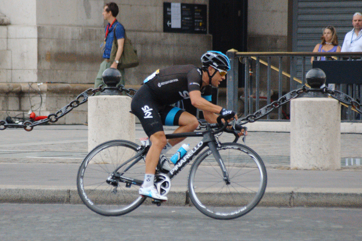 21è étape du Tour de France 2014, Evry-Paris Champs Elysées, photo prise à Paris au pied de l'Arc de Triomphe.